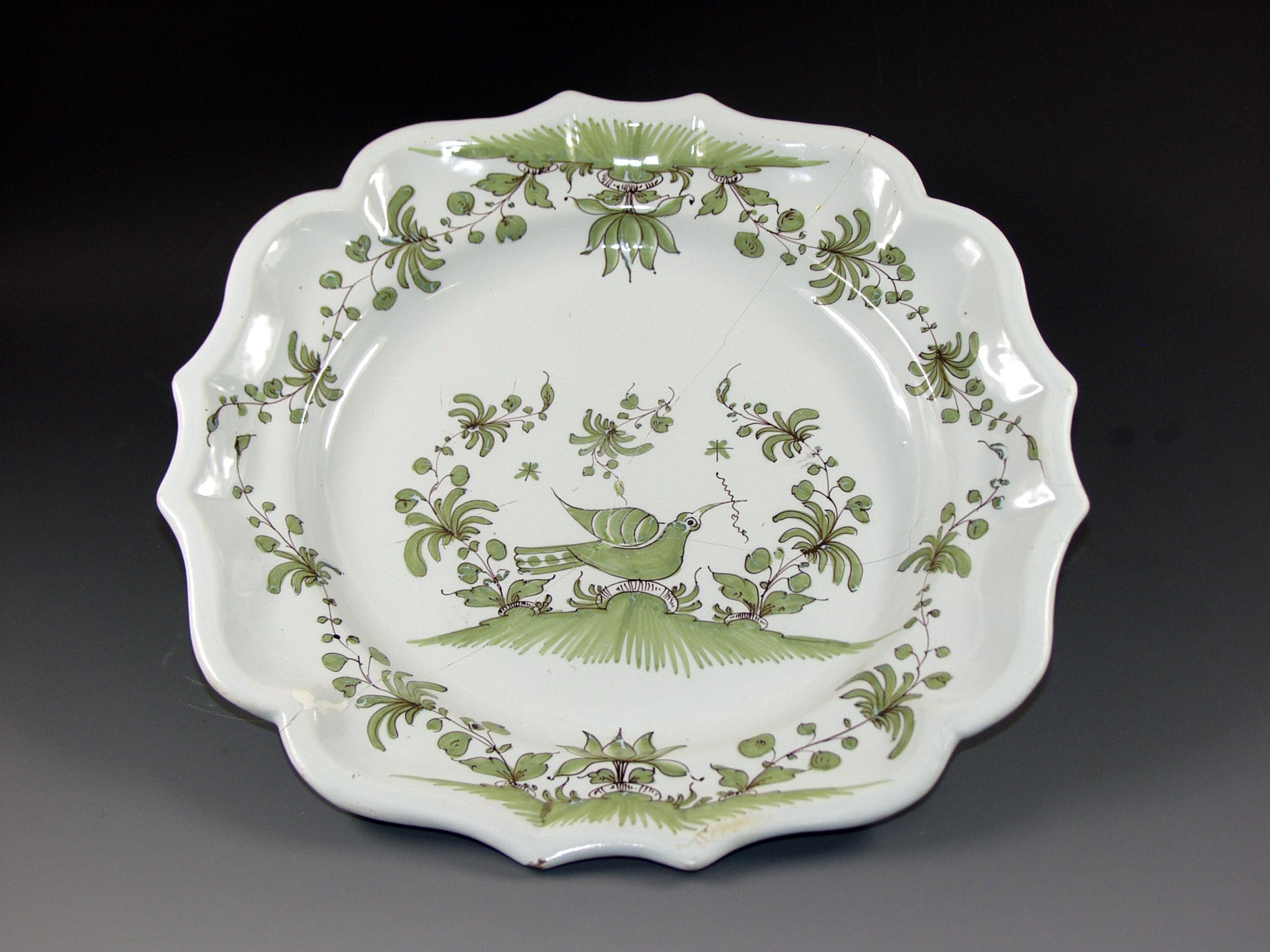 Plat en camaïeu vert à la palombe produit à Samadet vers 1750.999.01.19.jpg